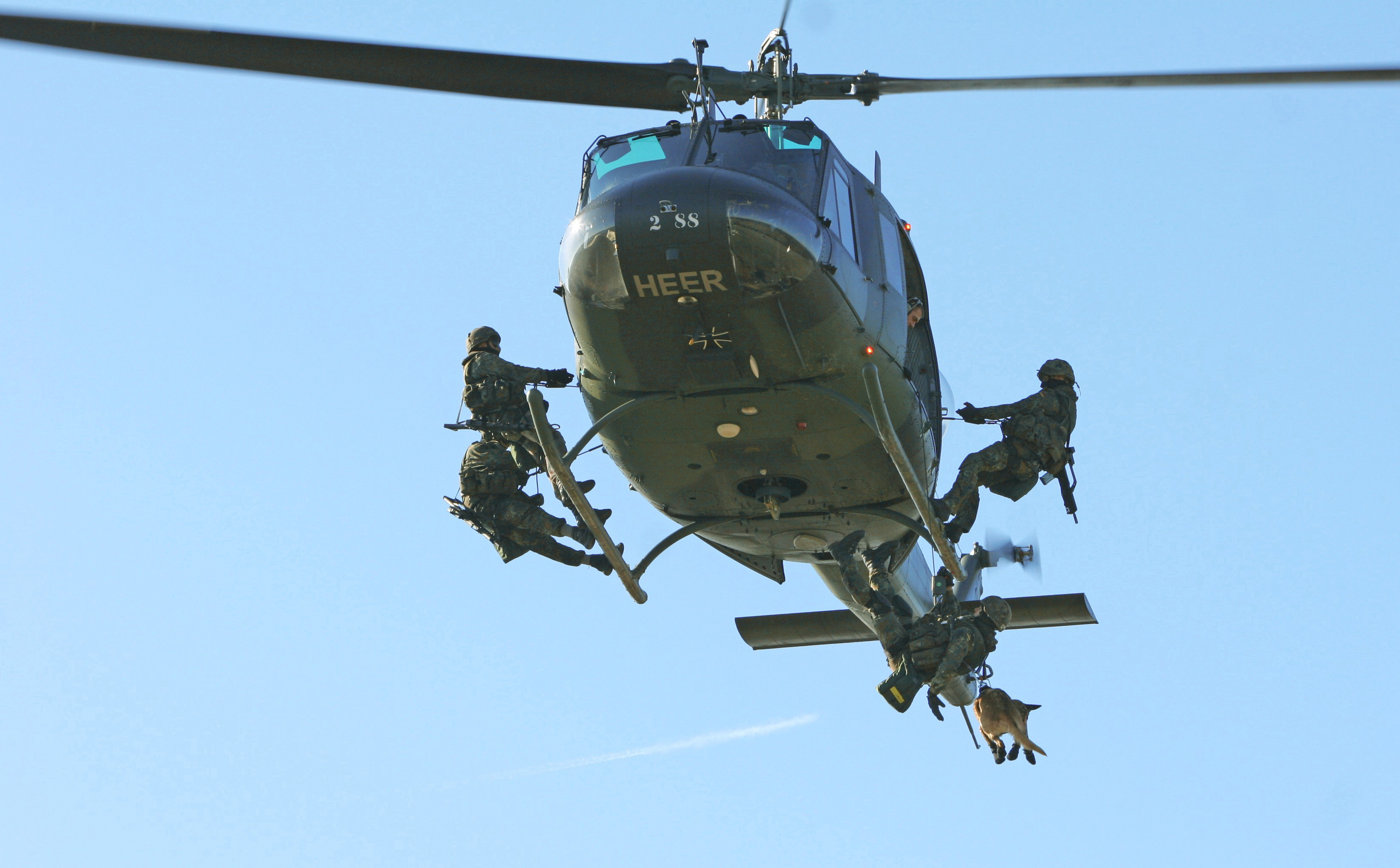 Abseilen aus der Bell UH 1D Training und Ausbilung beim Fallschirmjägerbataillon 262. Soldaten mit Diensthund seilen sich aus dem Hubschrauber ab. ©Bundeswehr/Koch